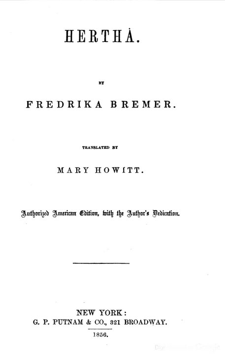 Försättsbladet till den amerikanska förstaupplagan av romanen Hertha.